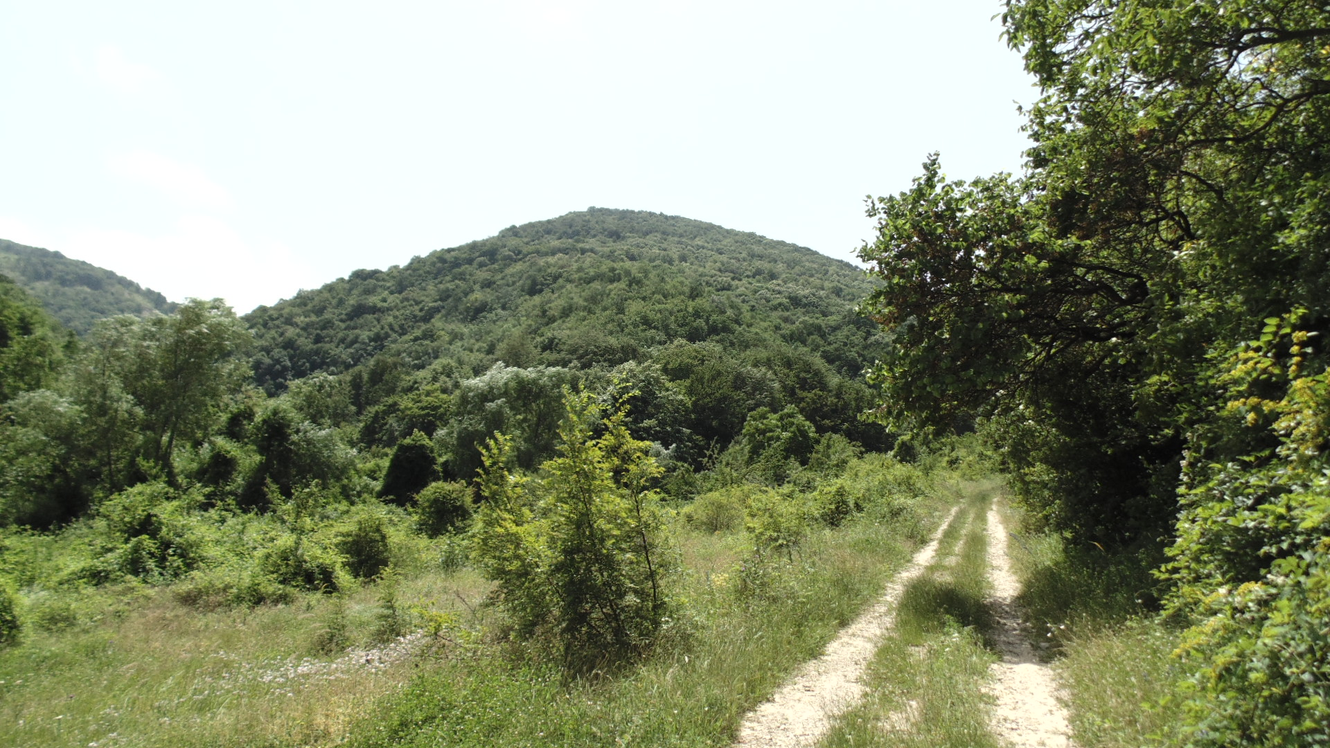 Из резервата